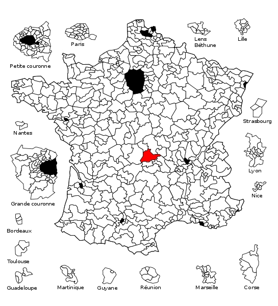 Localisation de la sixième circonscription du Puy-de-Dôme sur la carte des circonscriptions législatives de France.Base de travail : Representativite circonscriptionslegislatives fr bilan.jpg